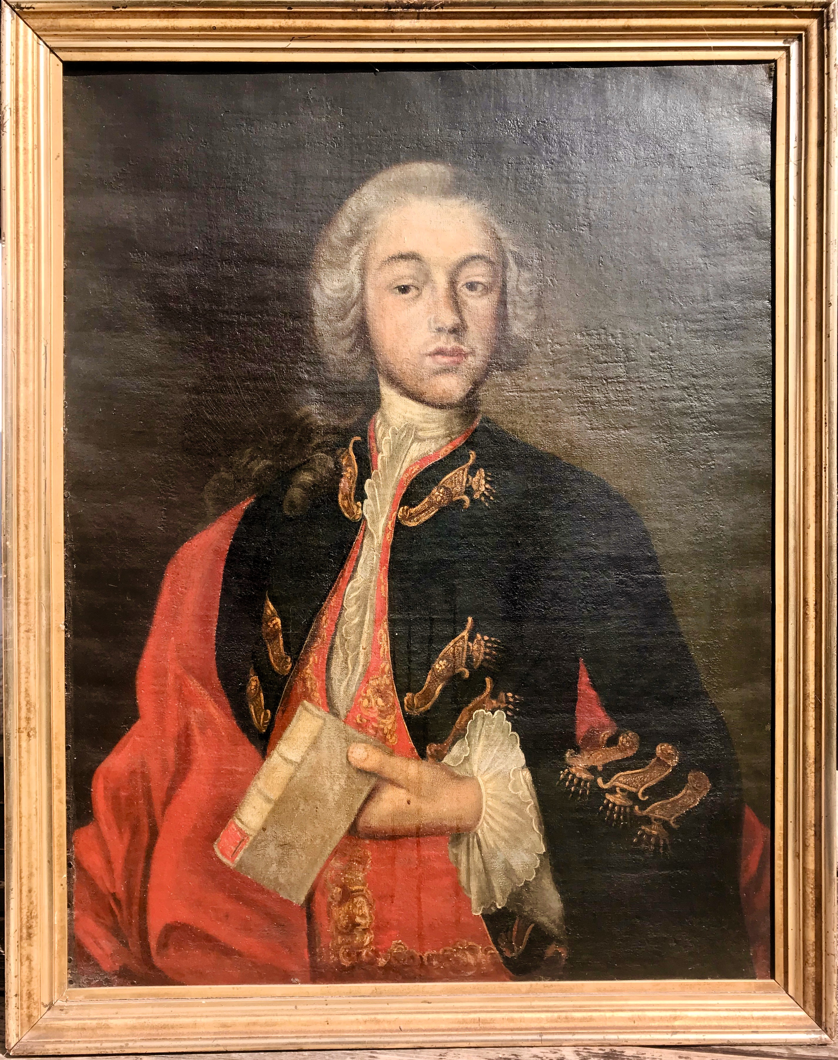 Ölgemälde von A. Sadeler, 1749 (aus Privatbesitz der Nachfahren)